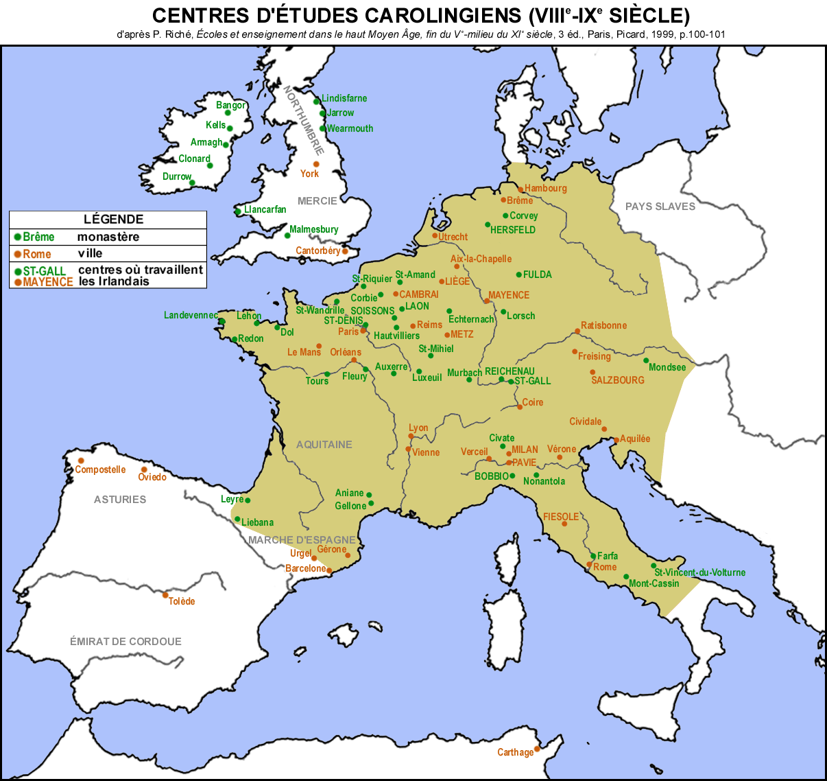 Centres d'études carolingiens (VIIIe-IXe siècle) Centers of studies in the Carolingian Empire (8th-9th centuries) D'après/After P. Riché, Écoles et enseignement dans le haut Moyen Âge, fin du Ve-milieu du XIe siècle, 3e éd., Paris, Picard, 1999, p.100-101